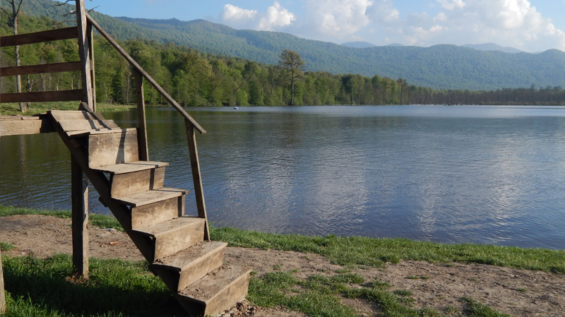 دریاچه الندان بخش چهاردانگه ساری در فرودین نود و سه